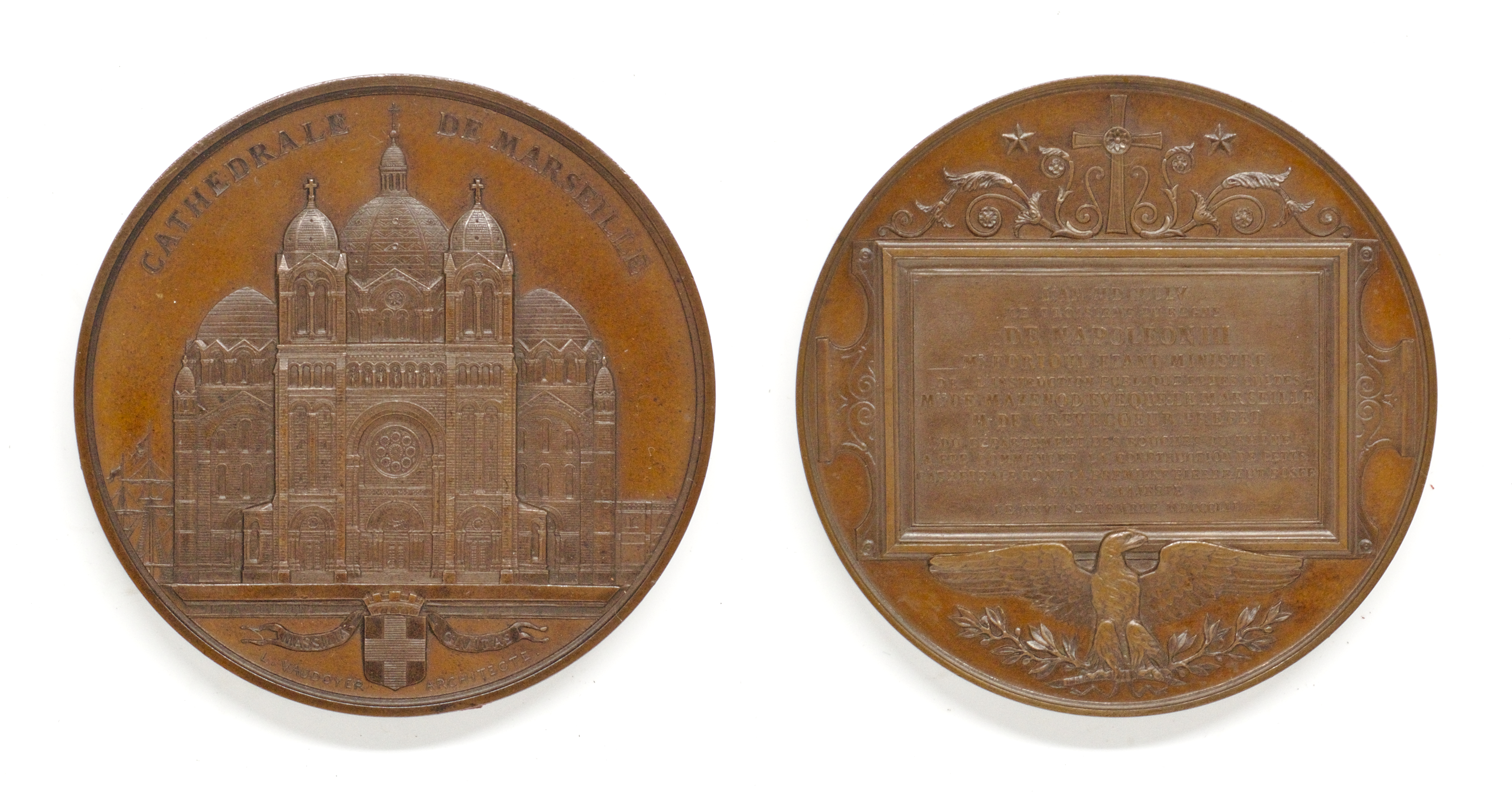 Médaille de la construction de la cathédrale de Marseille - Oudiné - 1860